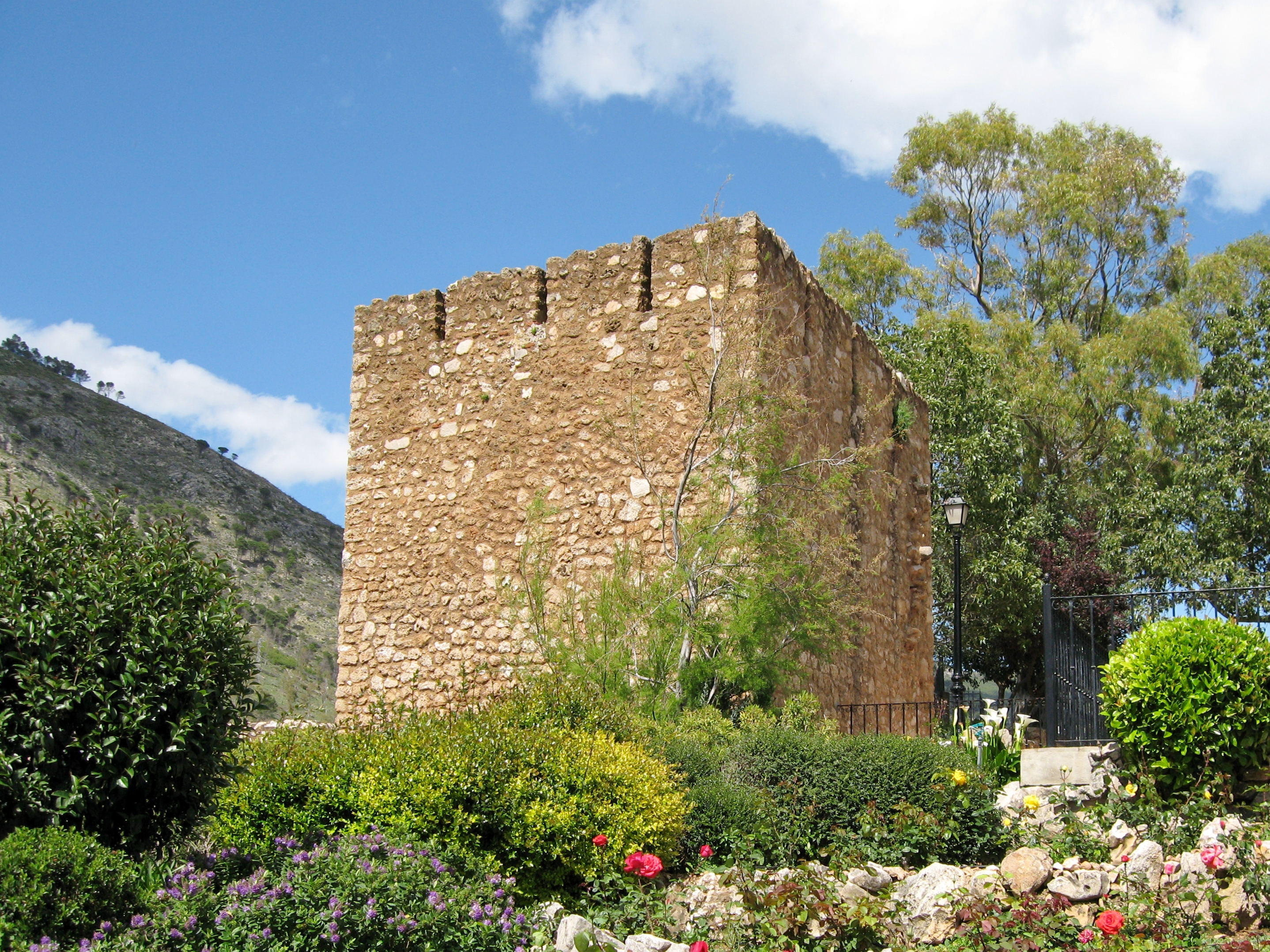 Festung von Mijas (Fortaleza de Mijas), Provinz Málaga, Andalusien, Spanien